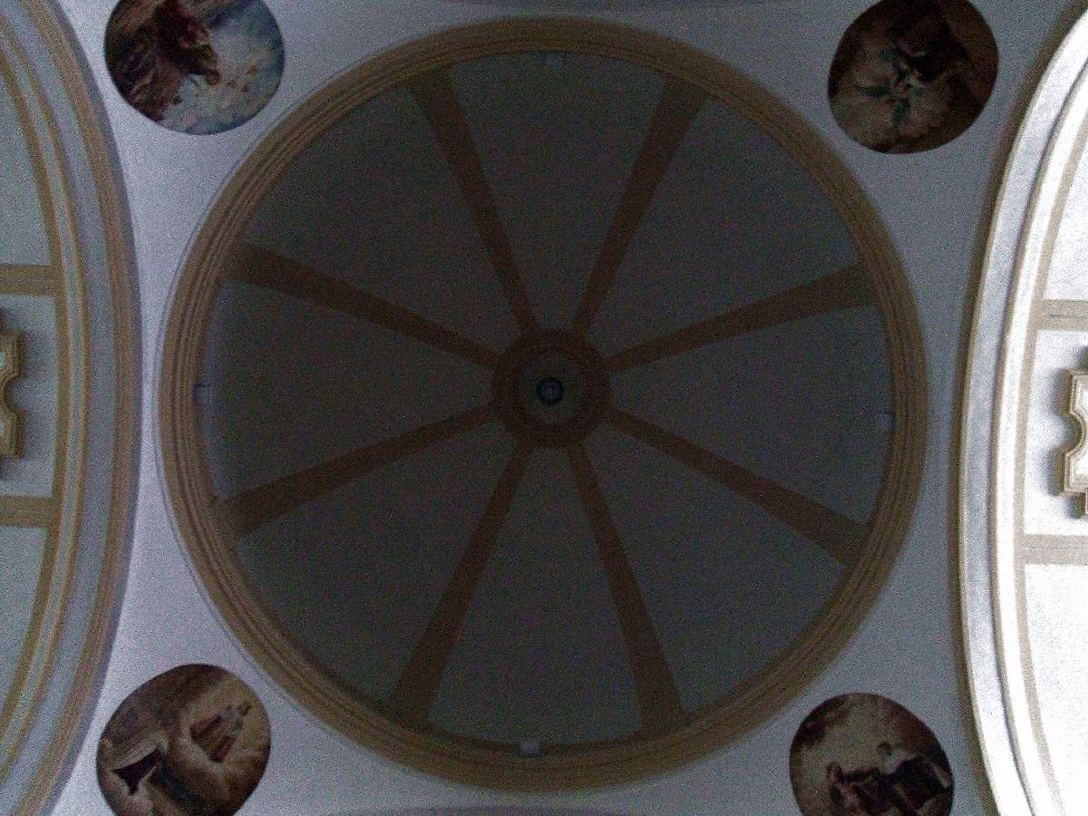 Cúpula del crucero de la iglesia del Carmen (PP Carmelitas Descalzos), Vitoria-Gasteiz, España/Spain